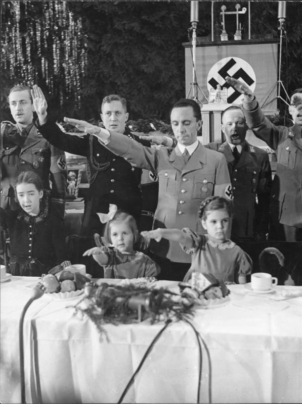 Berlin, Joseph Goebbels mit Kindern bei Weihnachtsfeier Deutsche Volksweihnacht 1937 Reichsminister Dr. Goebbels bei der grossen Weihnachtsfeier im Saalbau Friedrichshain Reichsminister Dr. Goebbels mit seinen Töchterchen Helga und Hilde während der nationalen Lieder. Fot.: Wag., 23.12.37 Abgebildete Personen: Goebbels, Joseph: Reichsminister für Volksaufklärung und Propaganda, Gauleiter Berlin, Deutschland